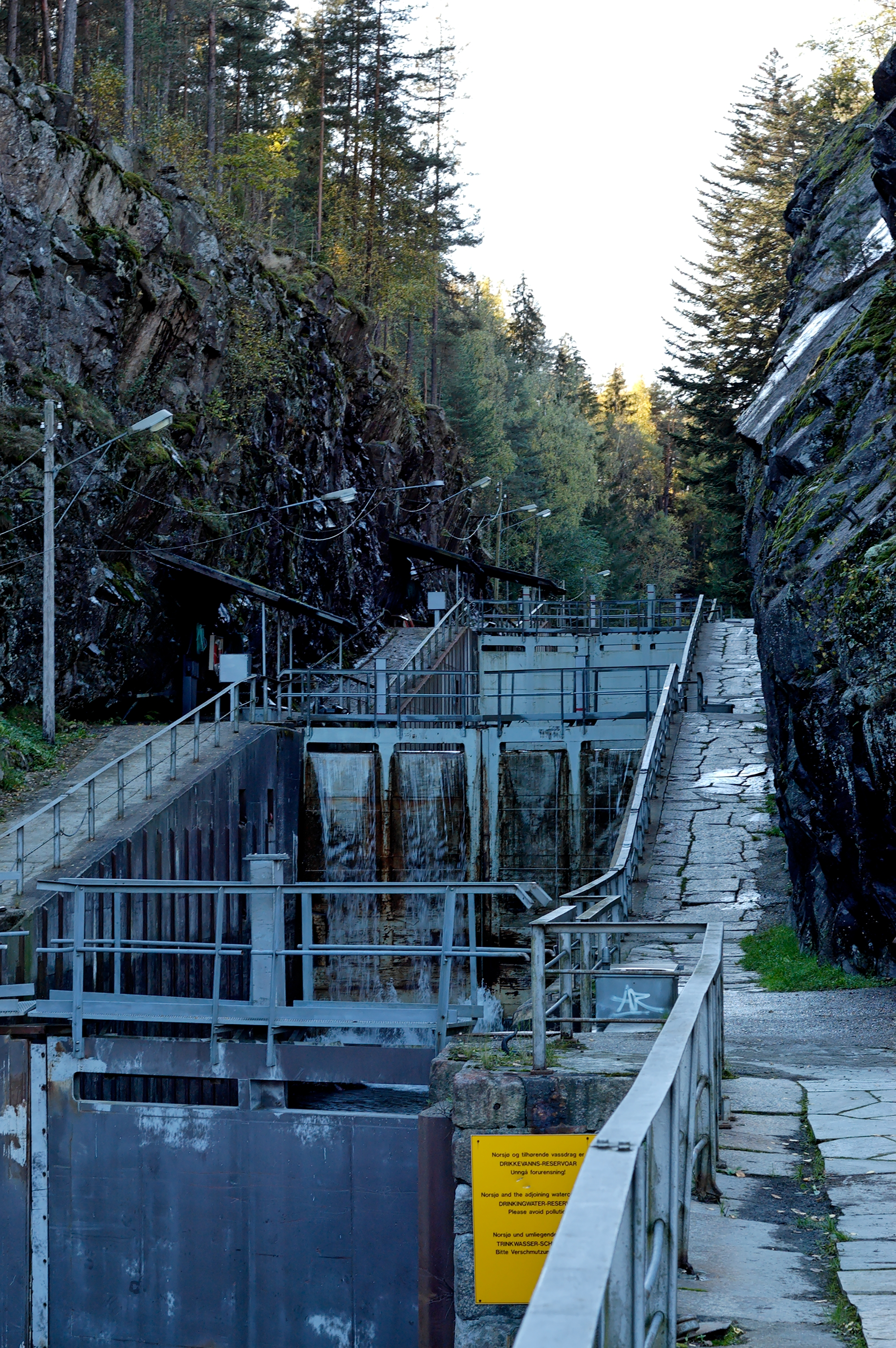 Løveid sluser i 2006.